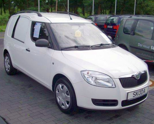 Škoda Praktik